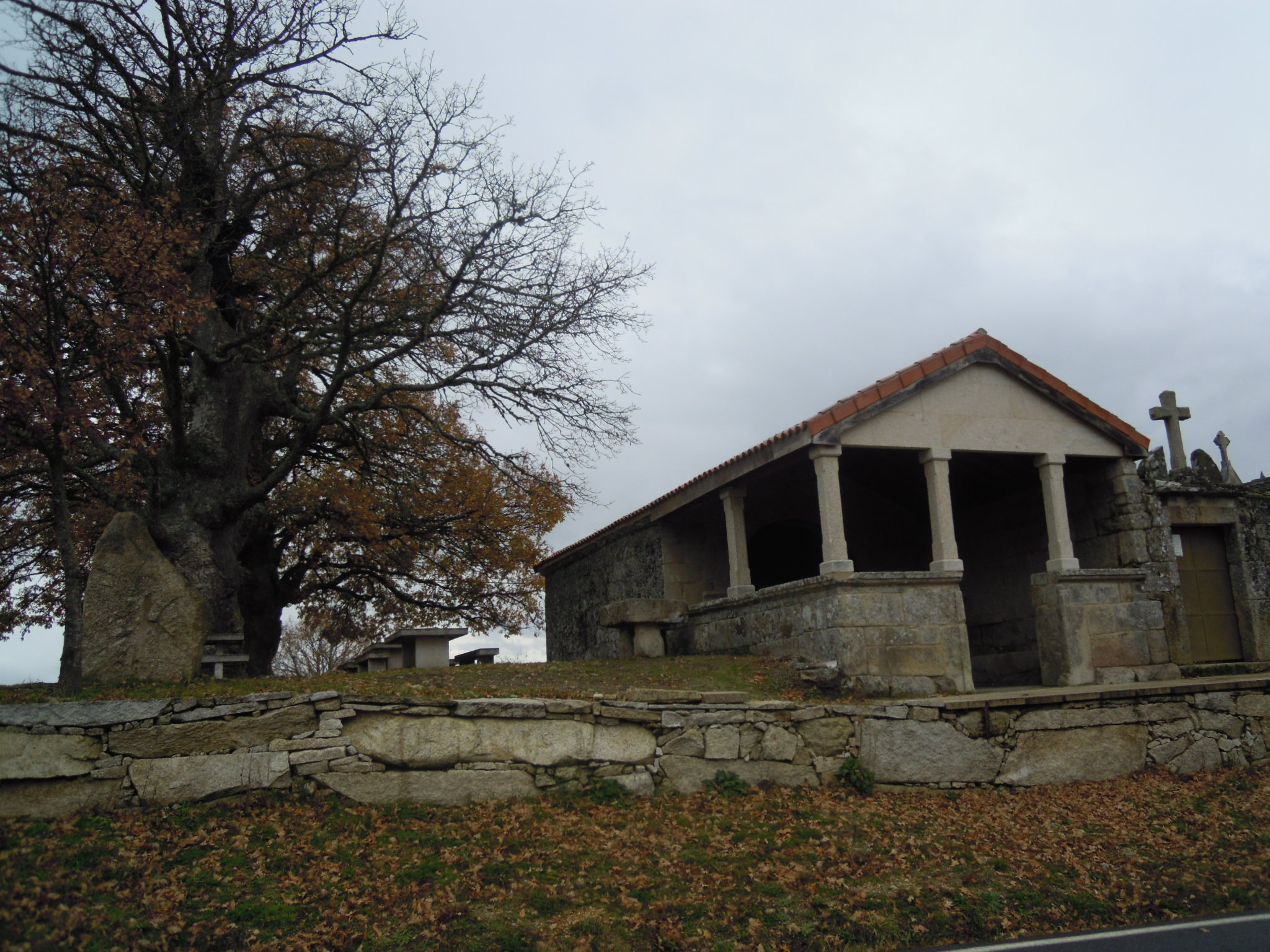 Capela de Santo Antón de Randín (Calvos de Randín).